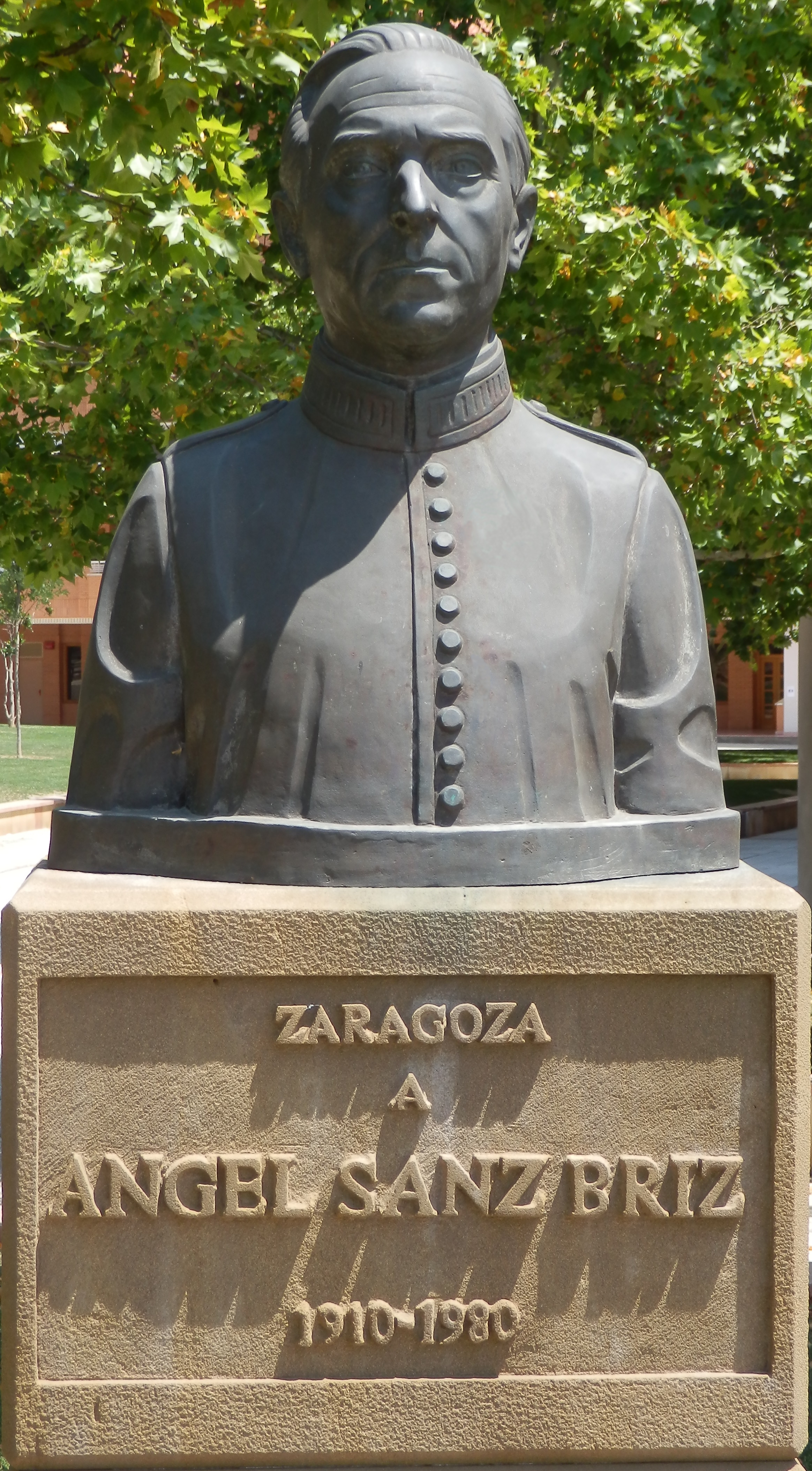 Busto de Ângel Sanz Briz en la plaza Ângel Sanz Briz de Zaragoza, España.